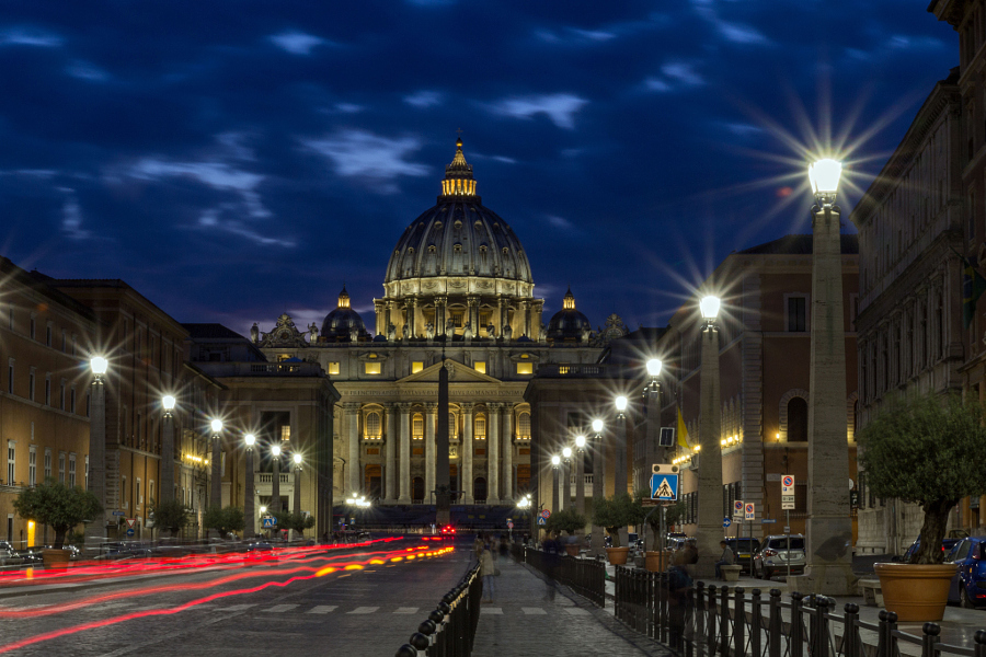 Виа делла Кончилиационе